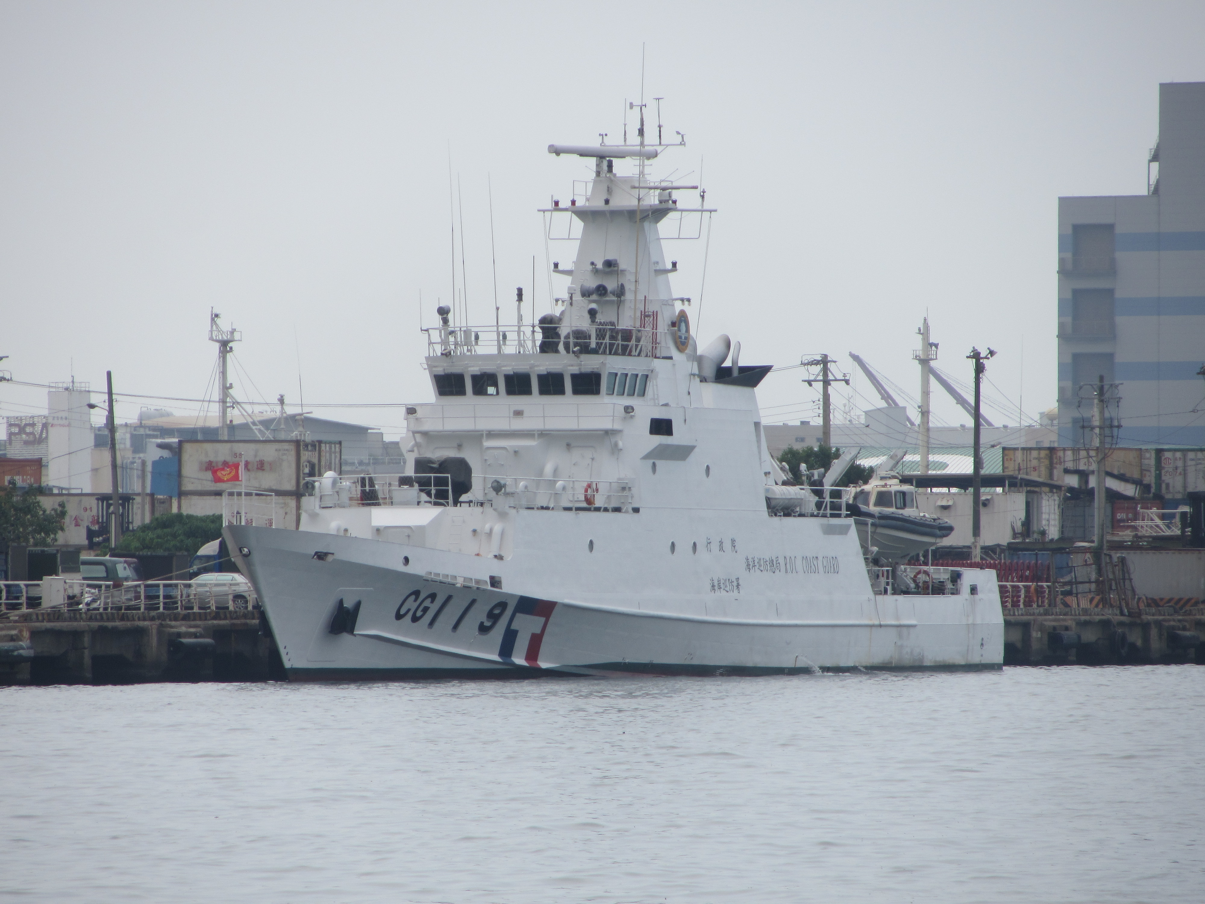 行政院海岸巡防署海洋巡防總局花蓮艦（居星艦、CG119）